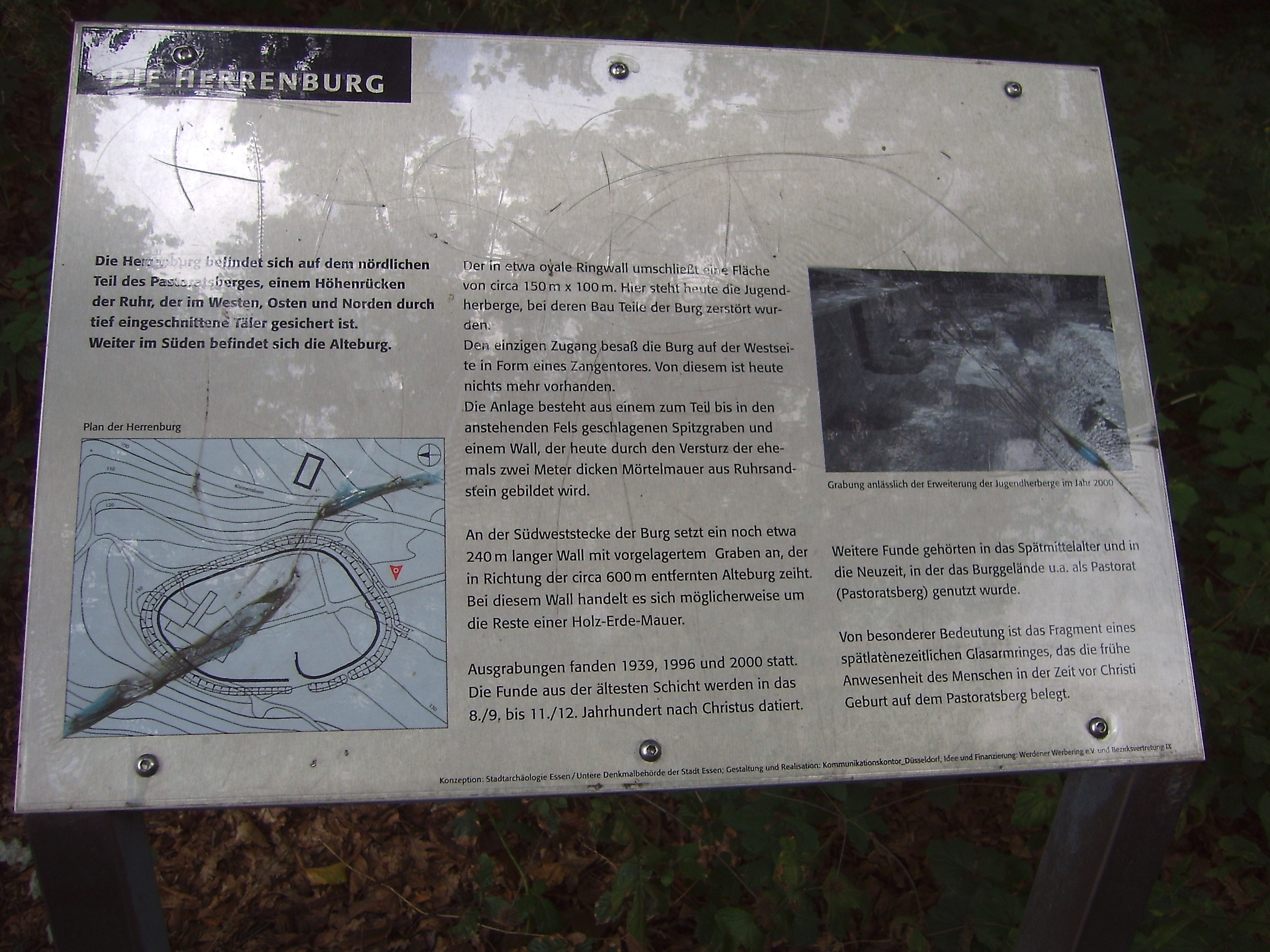 Denkmalschild Bodendenkmal Herrenburg Essen-Heidhausen